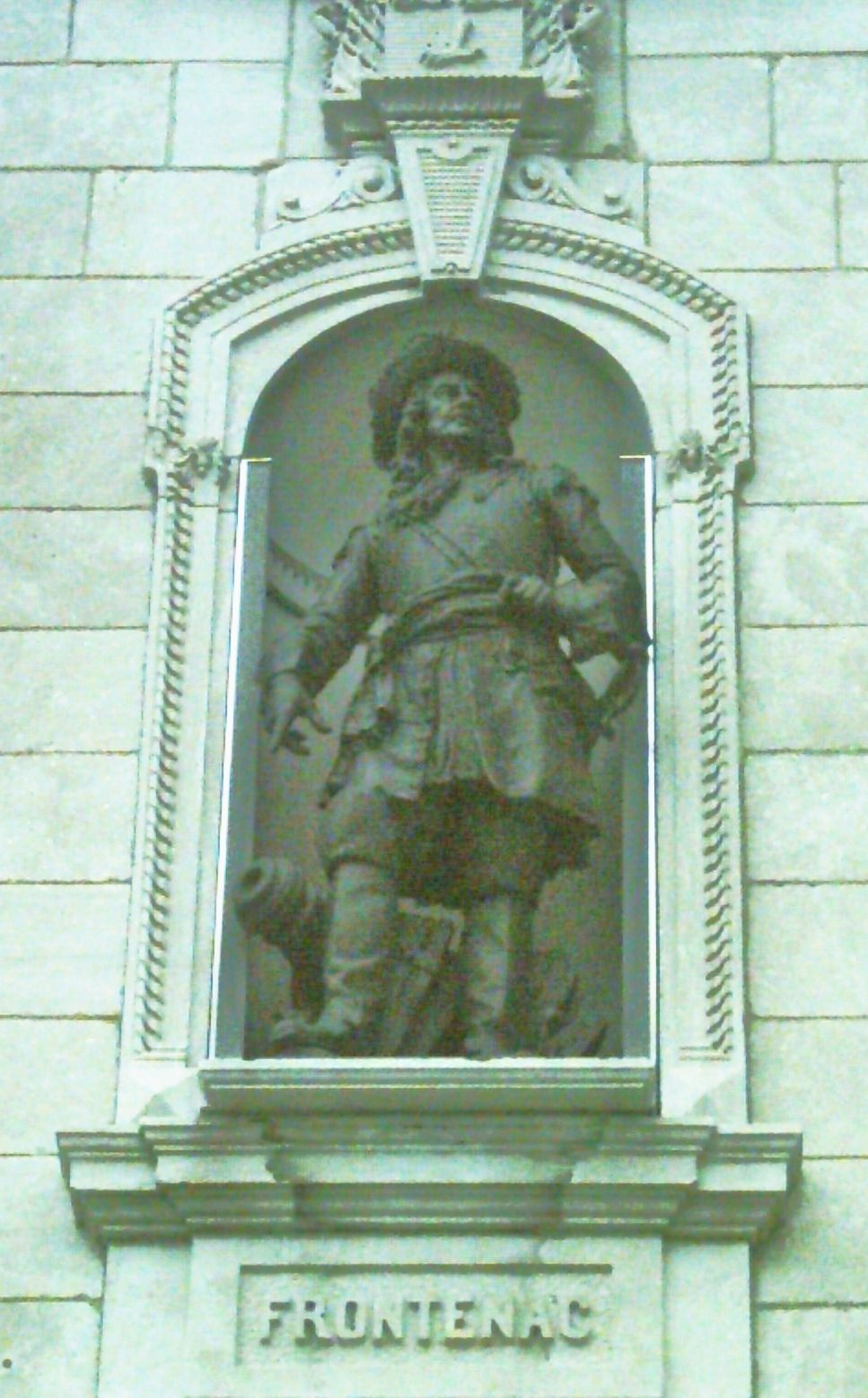 Louis de Buade, Comte de Frontenac, statue de la façade de l'hôtel du Parlement, Québec.